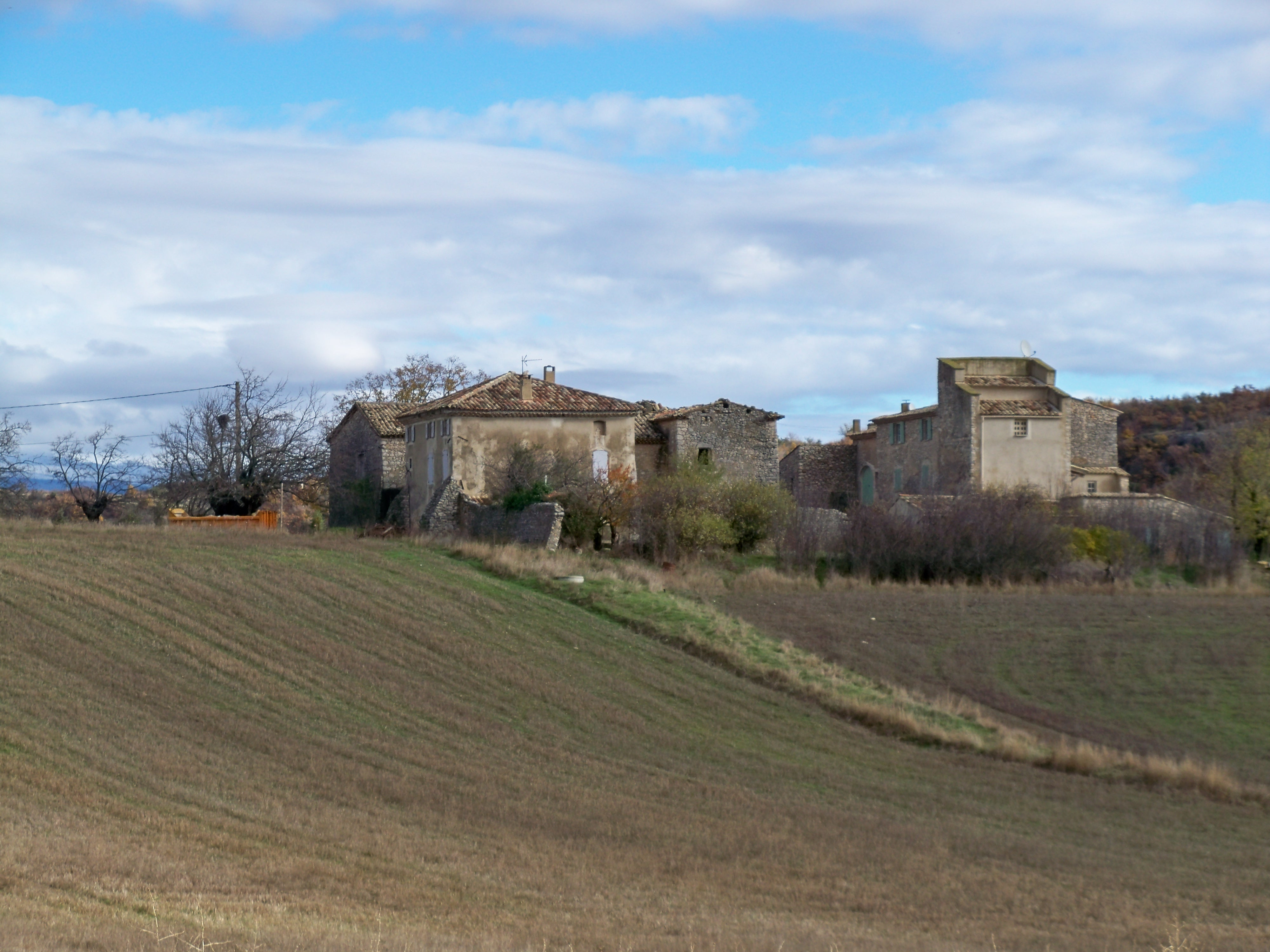 Maison à Terre à Simiane la Rotonde (04)